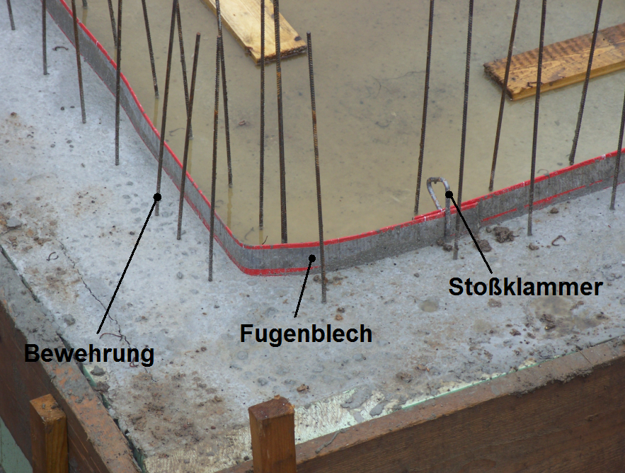 Bodenplatte mit Bewehrung, Fugenblech und einer Stoßklammer zur Verbindung von zwei Fugenblechsegmenten